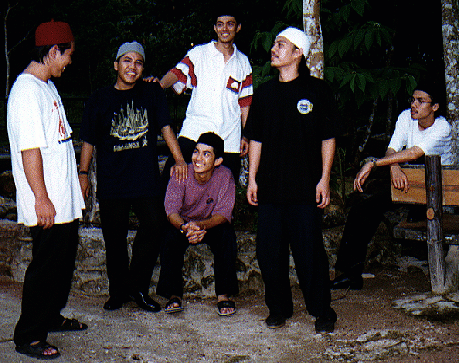 Kumpulan Adams di Ulu Yam sekitar tahun 2000.